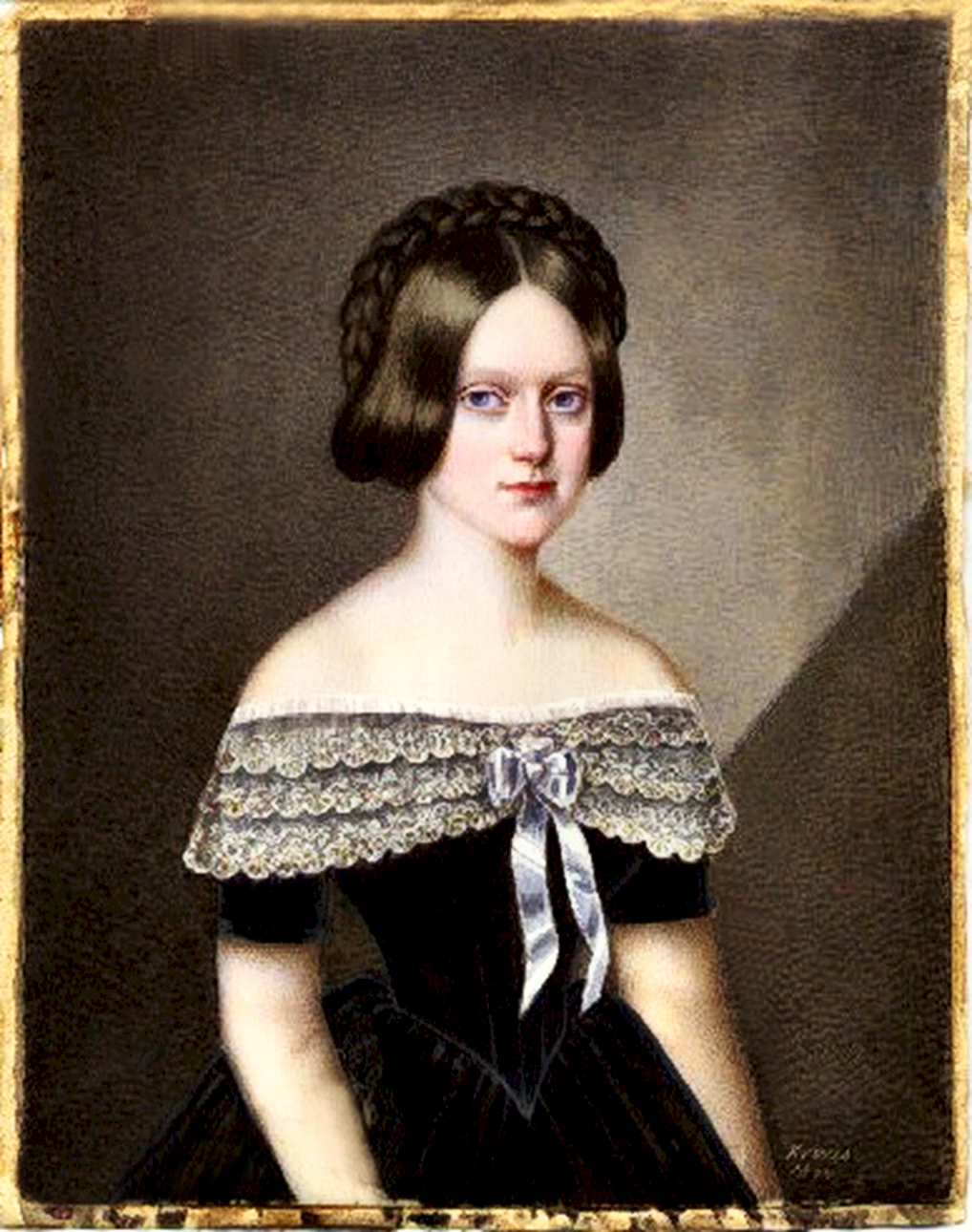 Antonia Kornides Edle von Krempach Gattin des Maximilian Anton Freiherrn Putz von Rolsberg